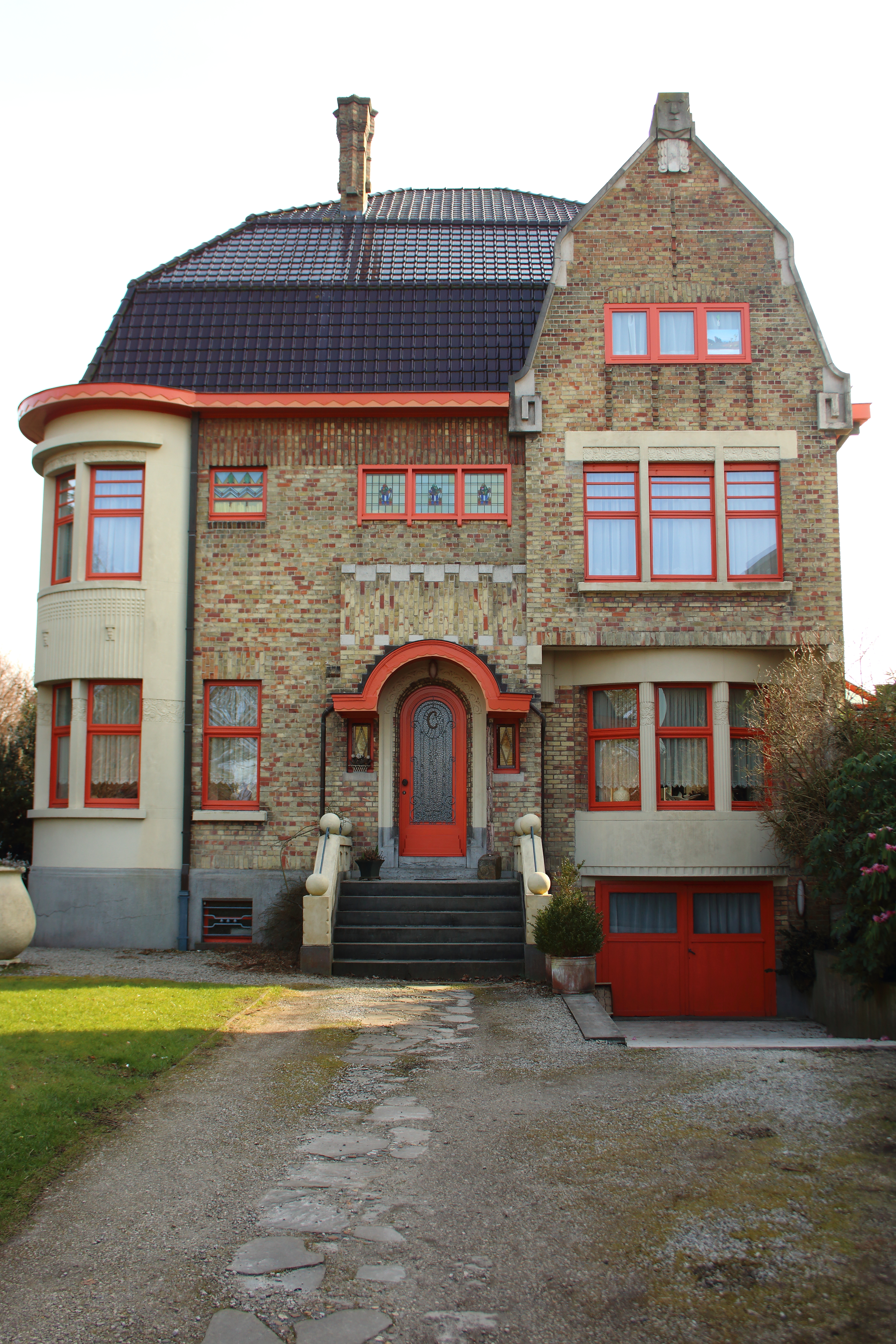 Art Decovilla 'Villa Cousy', Grotenbergestraat, Zottegem